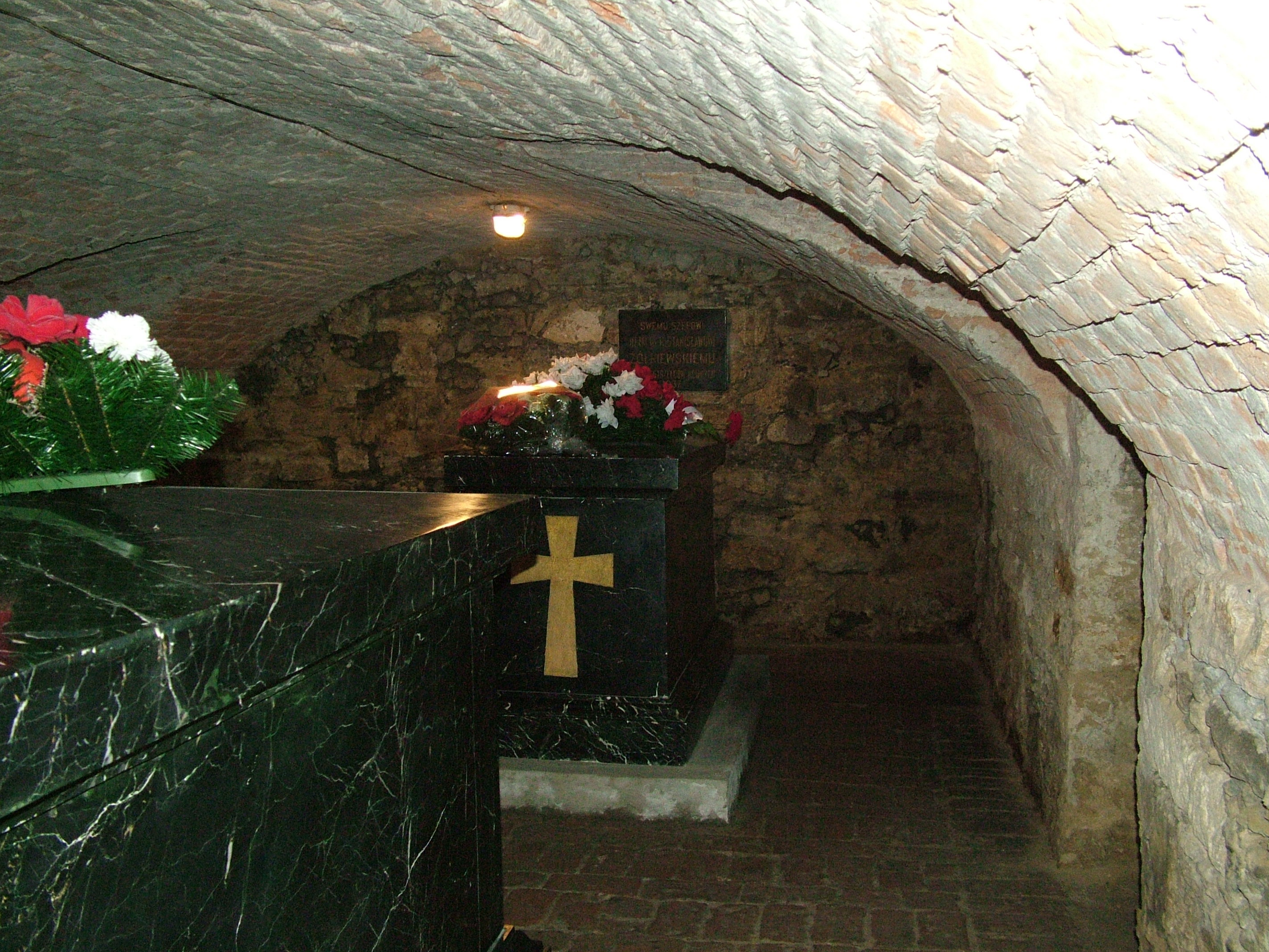 Krypta Żółkiewskich w podziemiach kościoła farnego w Żółkwi